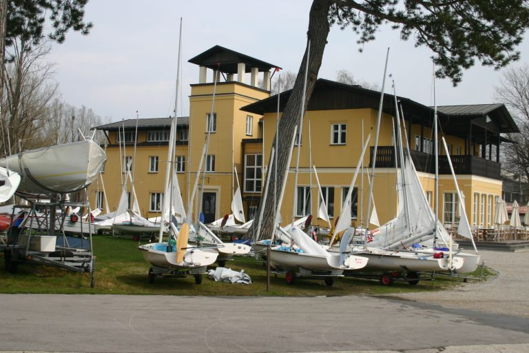 Bayerischer Yachtclub